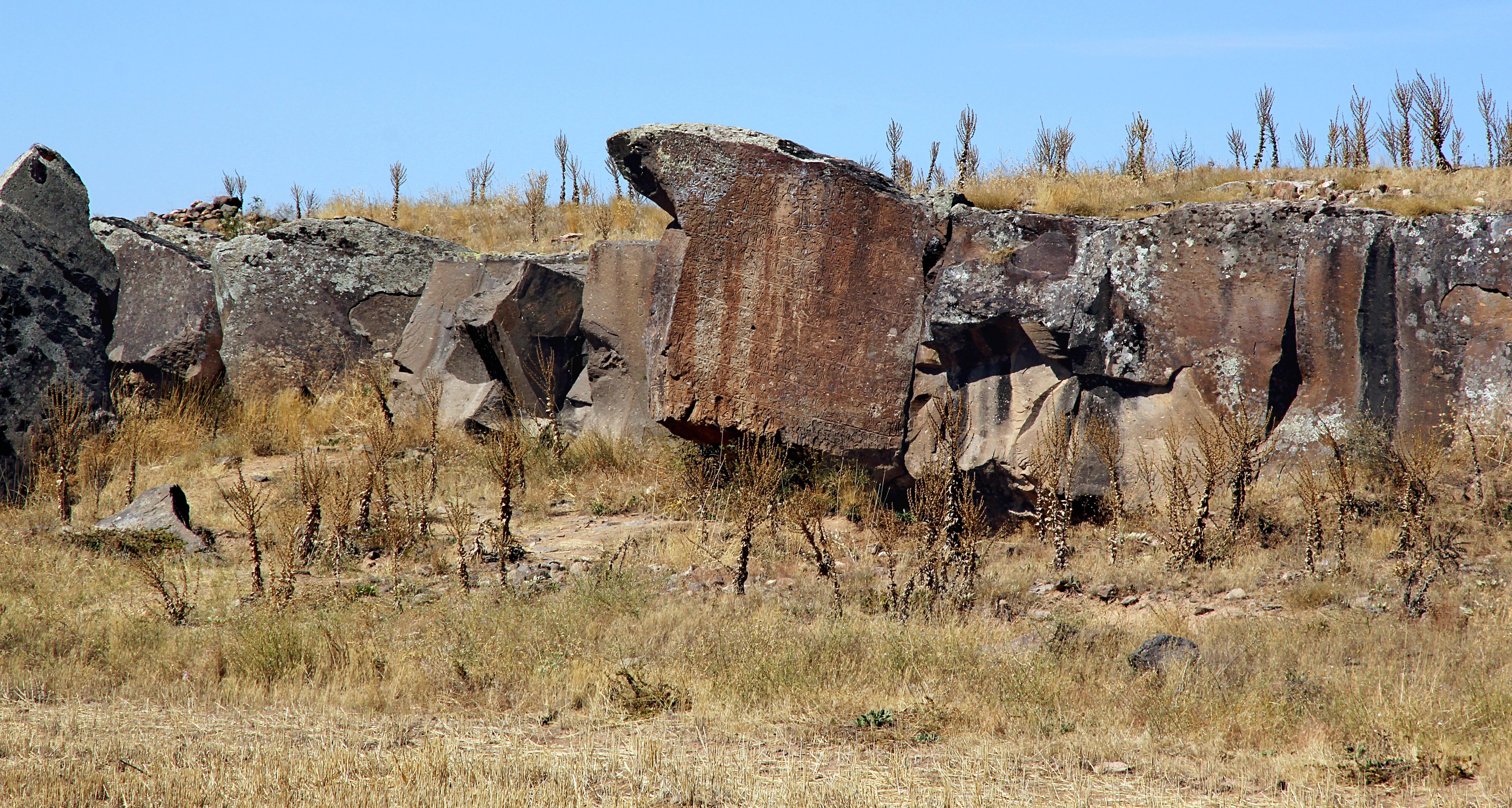 Luwische Felsinschrift von Topada, heute Acıgöl bei Aksaray, Zentraltürkei